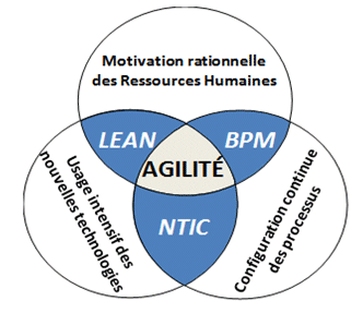 Composantes de l'Agilité